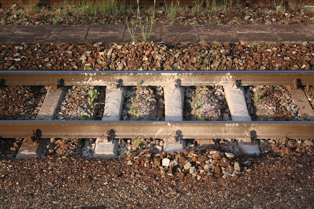 Ein Gleislagefehler in Ingolstadt Hauptbahnhof